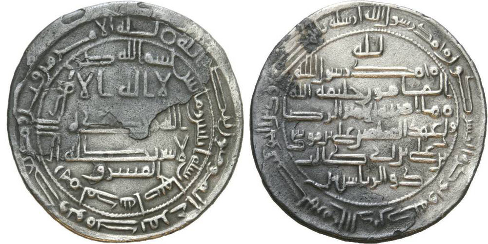 Аббасидский дирхам, м.д. Мадинат Исбахан, 202 г.х. Текст в поле реверса, сверху вниз: "Богу/Мухаммад посланник Аллаха. Аль-Мамун халиф Аллаха./Из тех что приказал амир Ар-Рида/наследник завета мусульман Али бин Муса/бин Али бин Абу Талиб/ Зуль-Риясатайн"